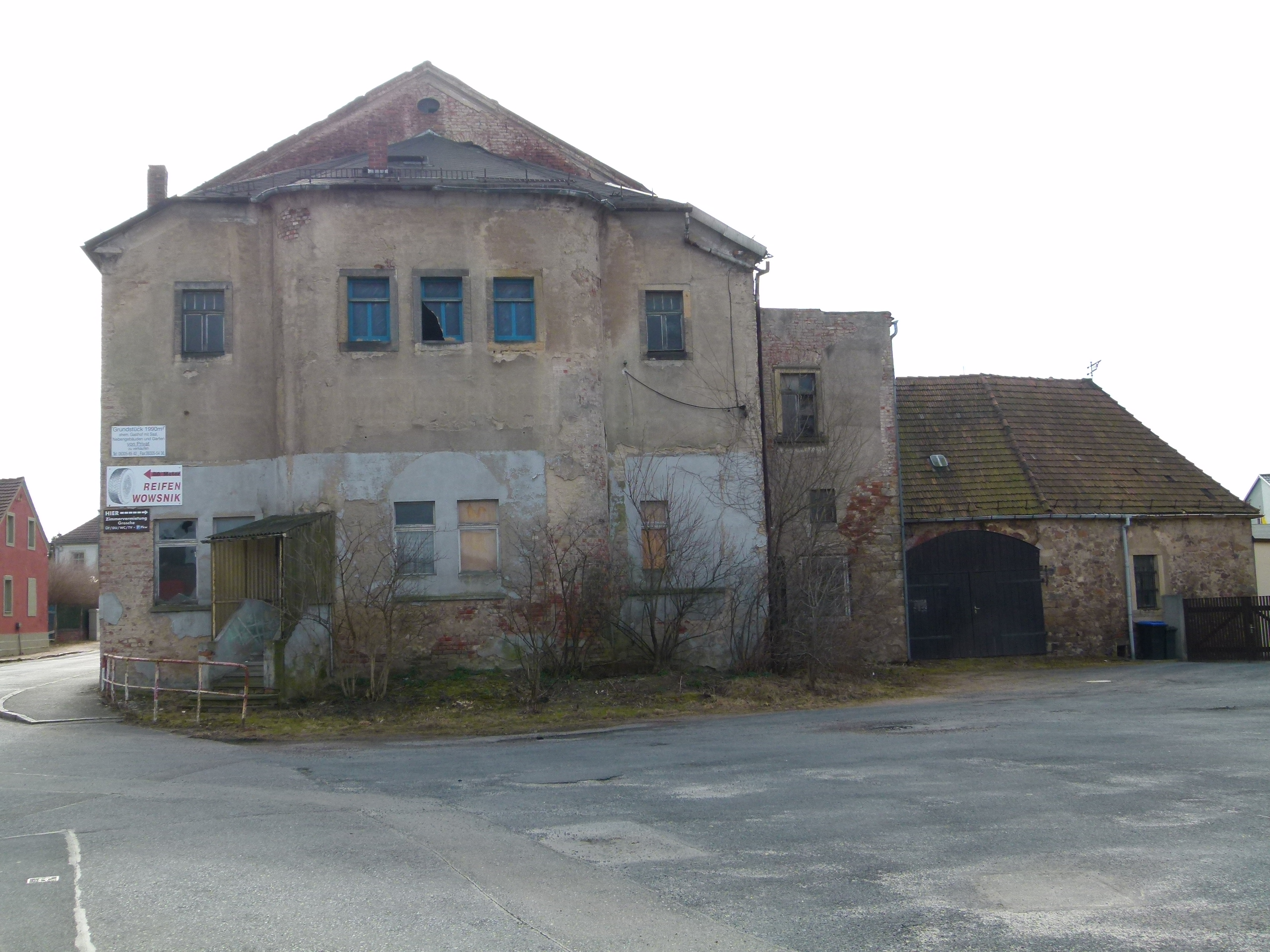 Ehemaliges Gasthaus, Altnaundorf 35, Radebeul